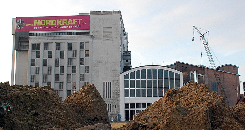 Kulturhuset Nordkraft, Aalborg